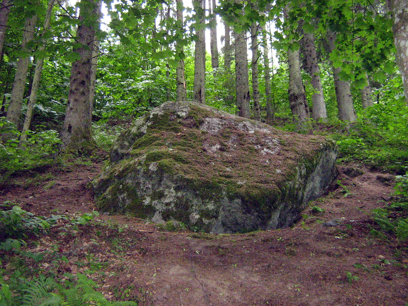 Mikytų alkakalnis, mitologinis akmuo, Plungės rajonas, Žemaitijos nacionalinio parko teritorija Foto: Algirdas, 2007 m. birželio 15 d., Lietuva